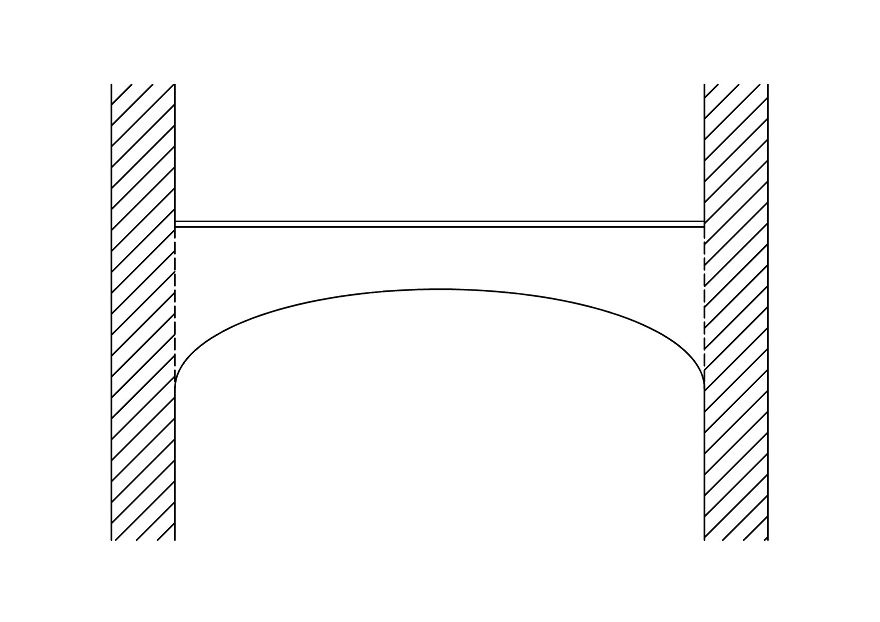 Schwibbogen oder Schwiebbogen ist ein Bogen, der den Abstand zwischen zwei Gebäuden überbrückt, die parallel zueinander stehen und gegeneinander abgestützt werden sollen; auch fälschlich für den gotischen Strebebogen.